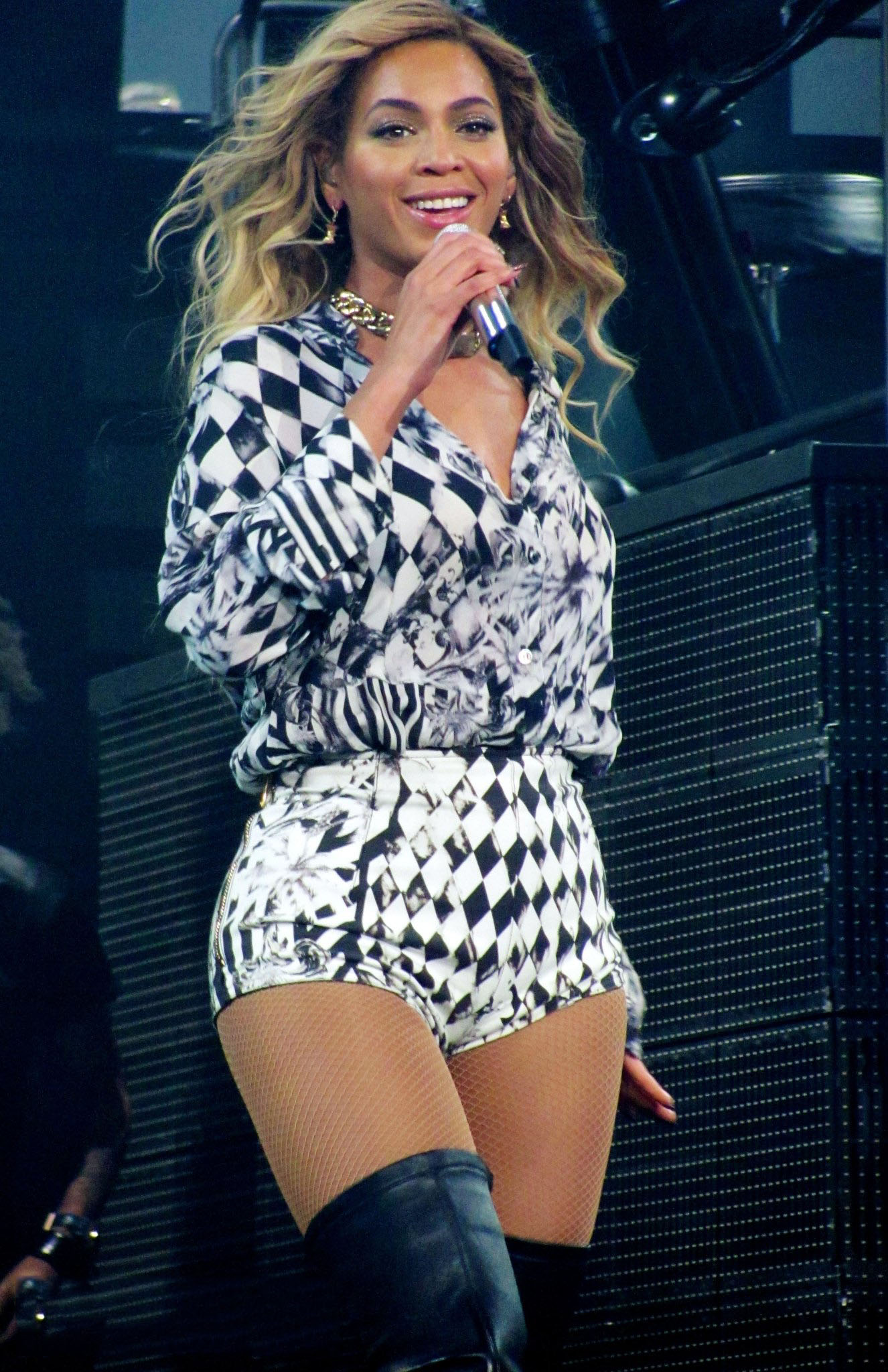 Beyonce en el The O2 Arena durante su tour The Mrs. Carter Show World Tour en Londres